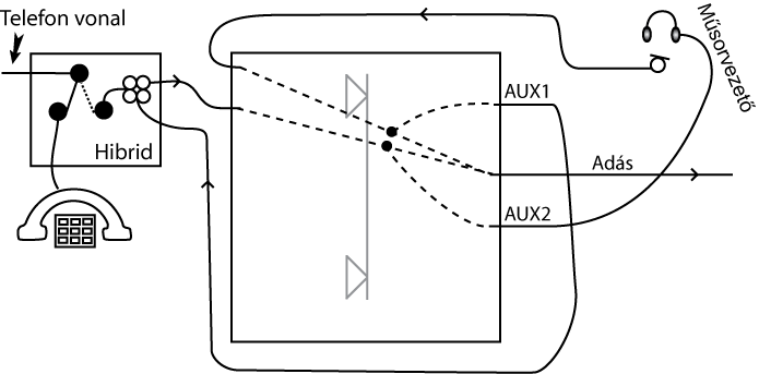 Telefonhibrid